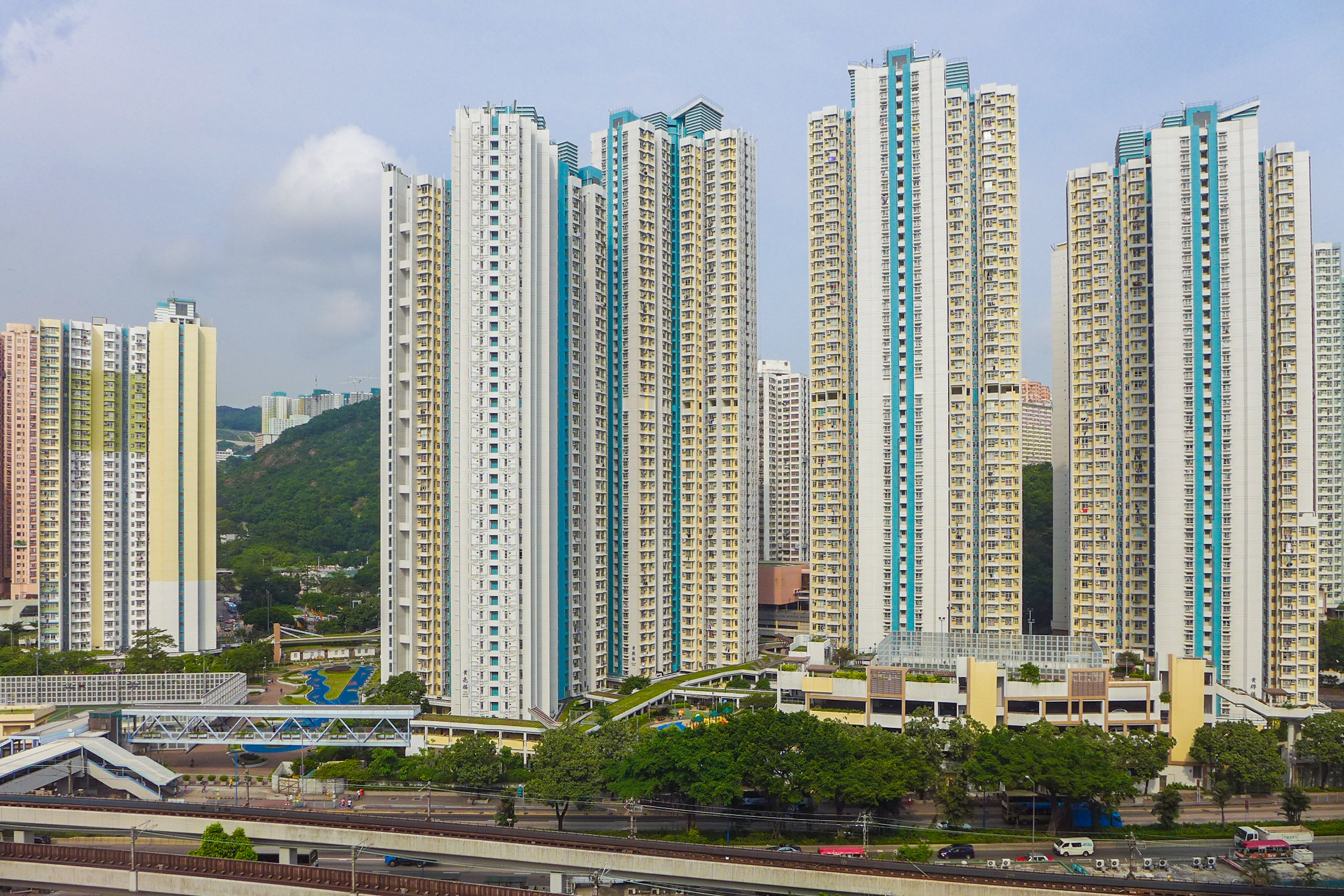 Lower Ngau Tau Kok Estate